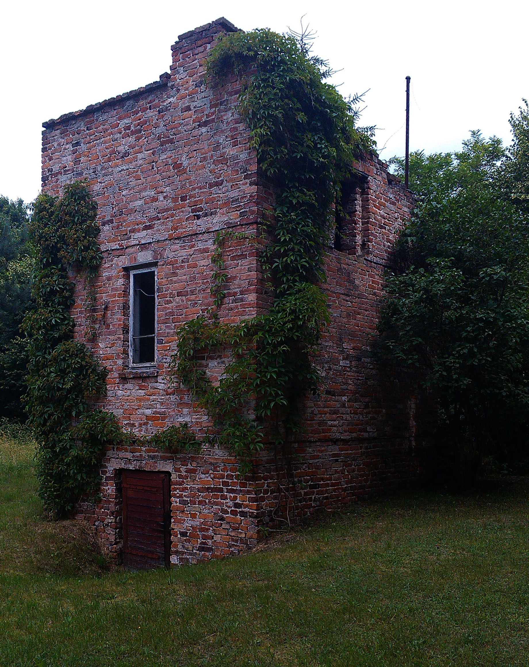 Opuszczona wieś Ławy.